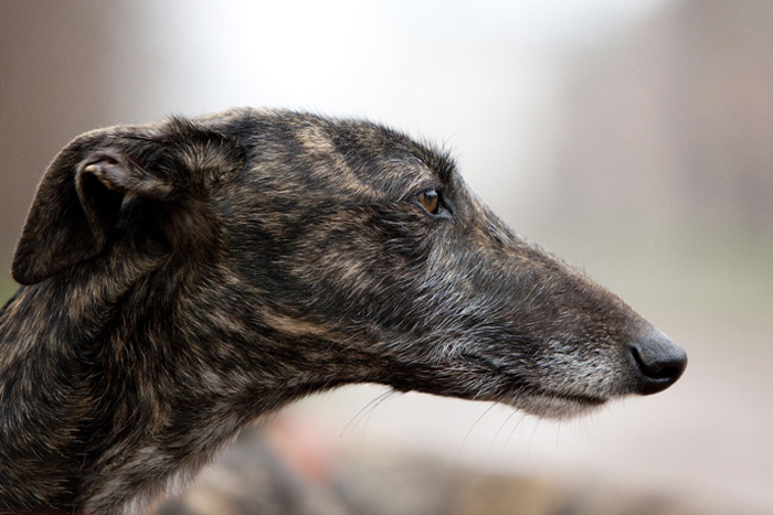 Primer plano de un Galgo Español visto de perfil